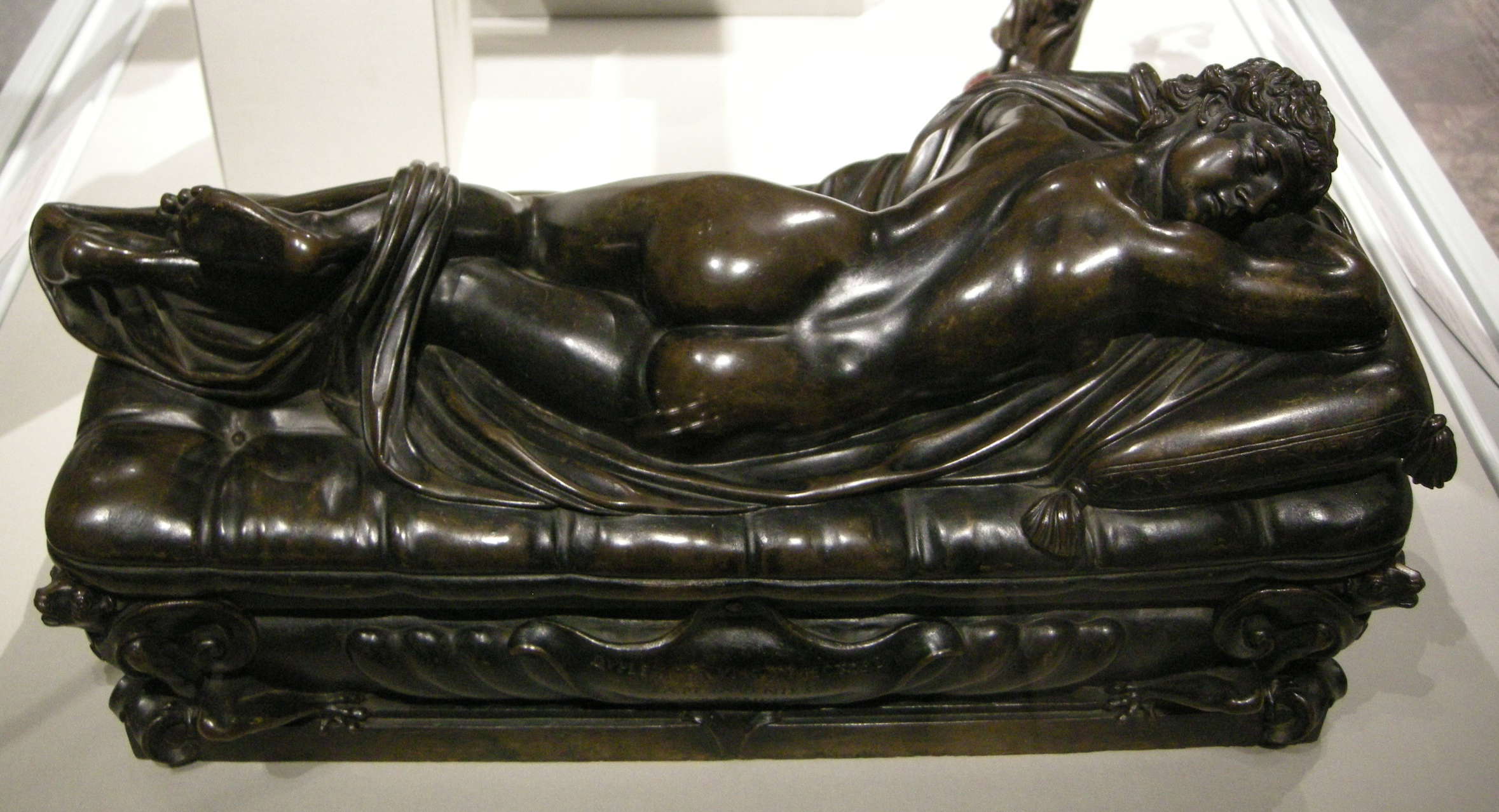 Giovan francesco susini, ermafrodito, firmato e datato 1639